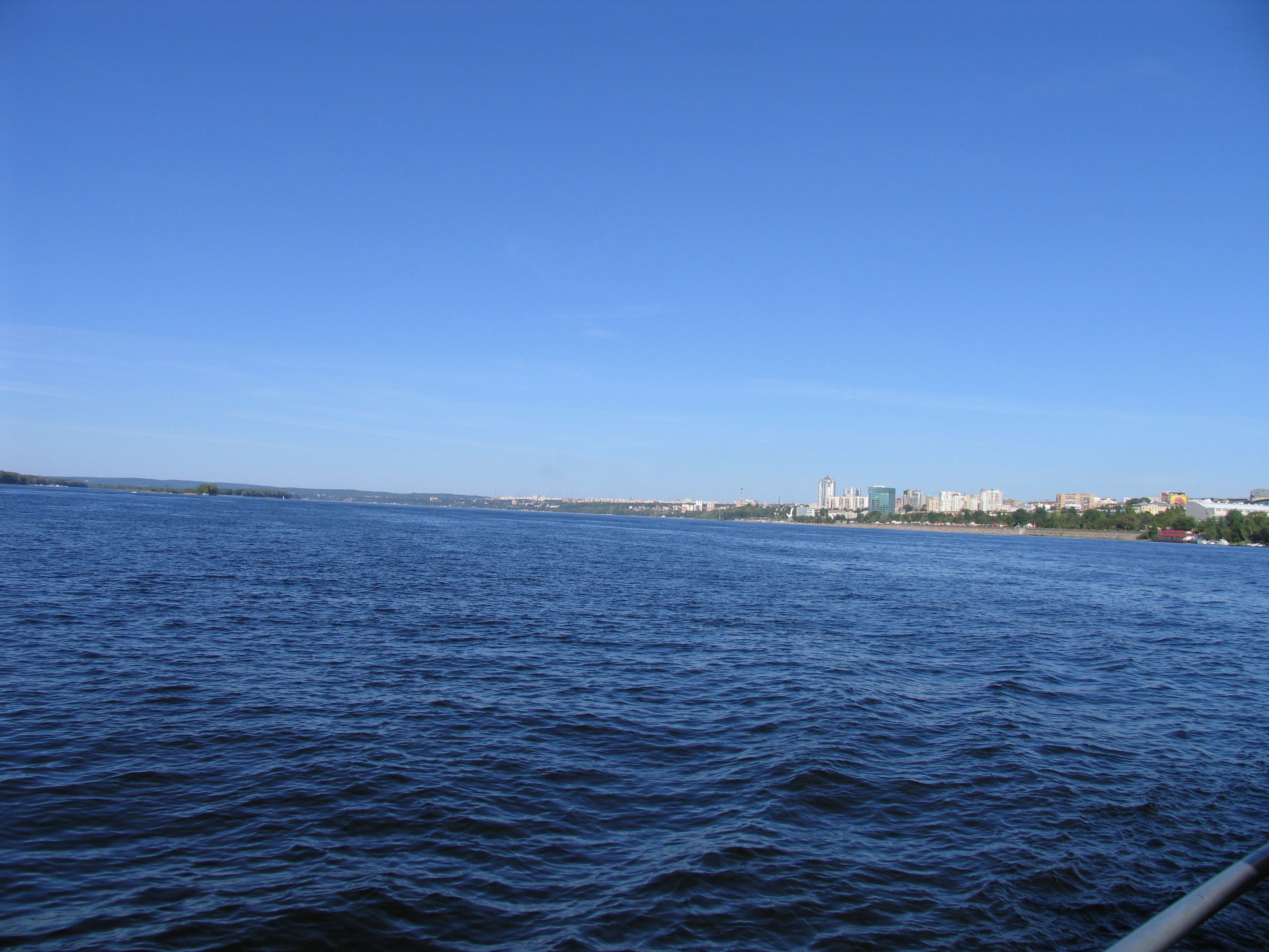 Leninskiy rayon, Samara, Samarskaya oblast', Russia